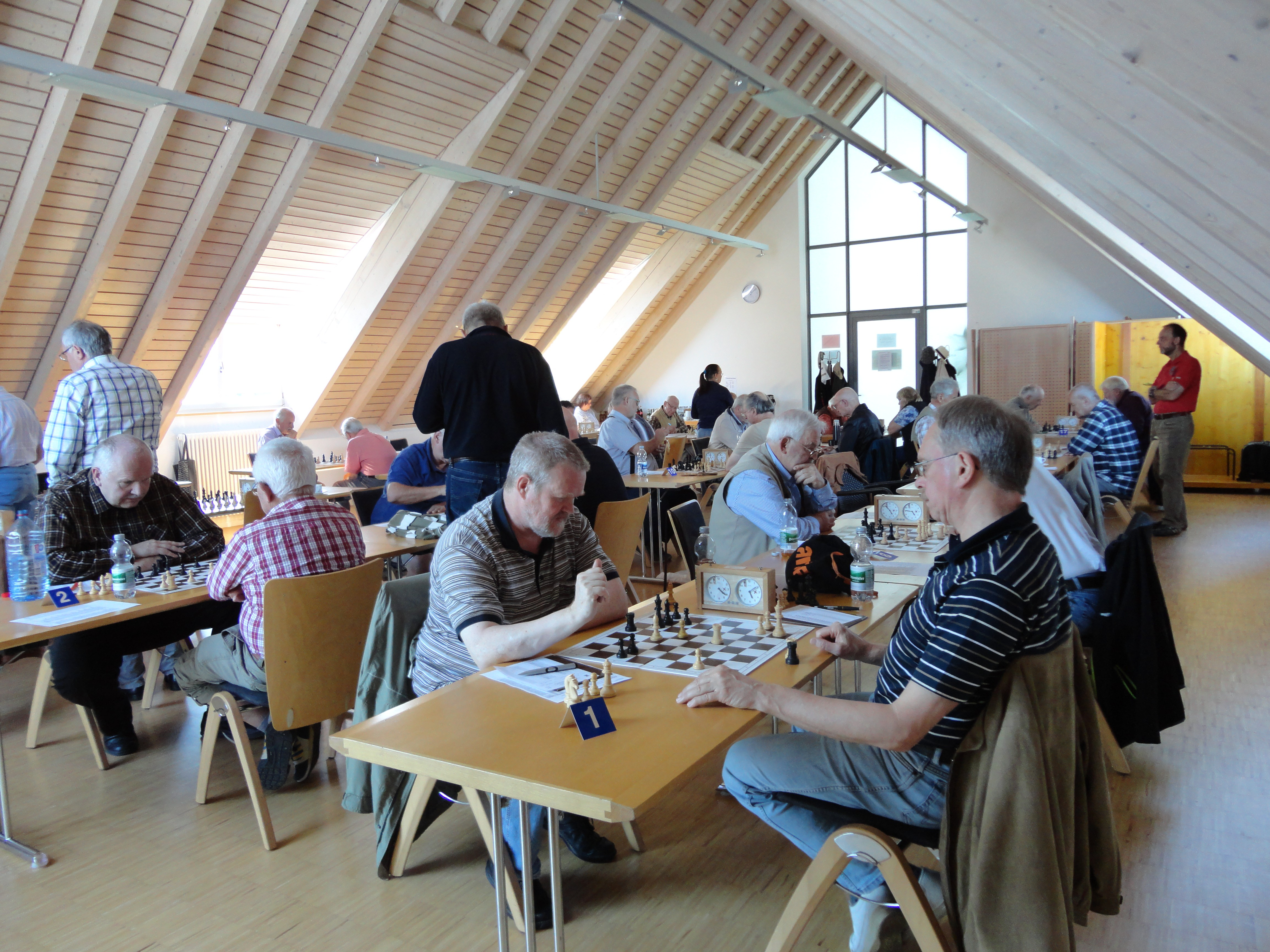 Bürgersaal im Bürgerhaus in Haslach im Kinzigtal, 2015 während eines Schachturnieres für Senioren.